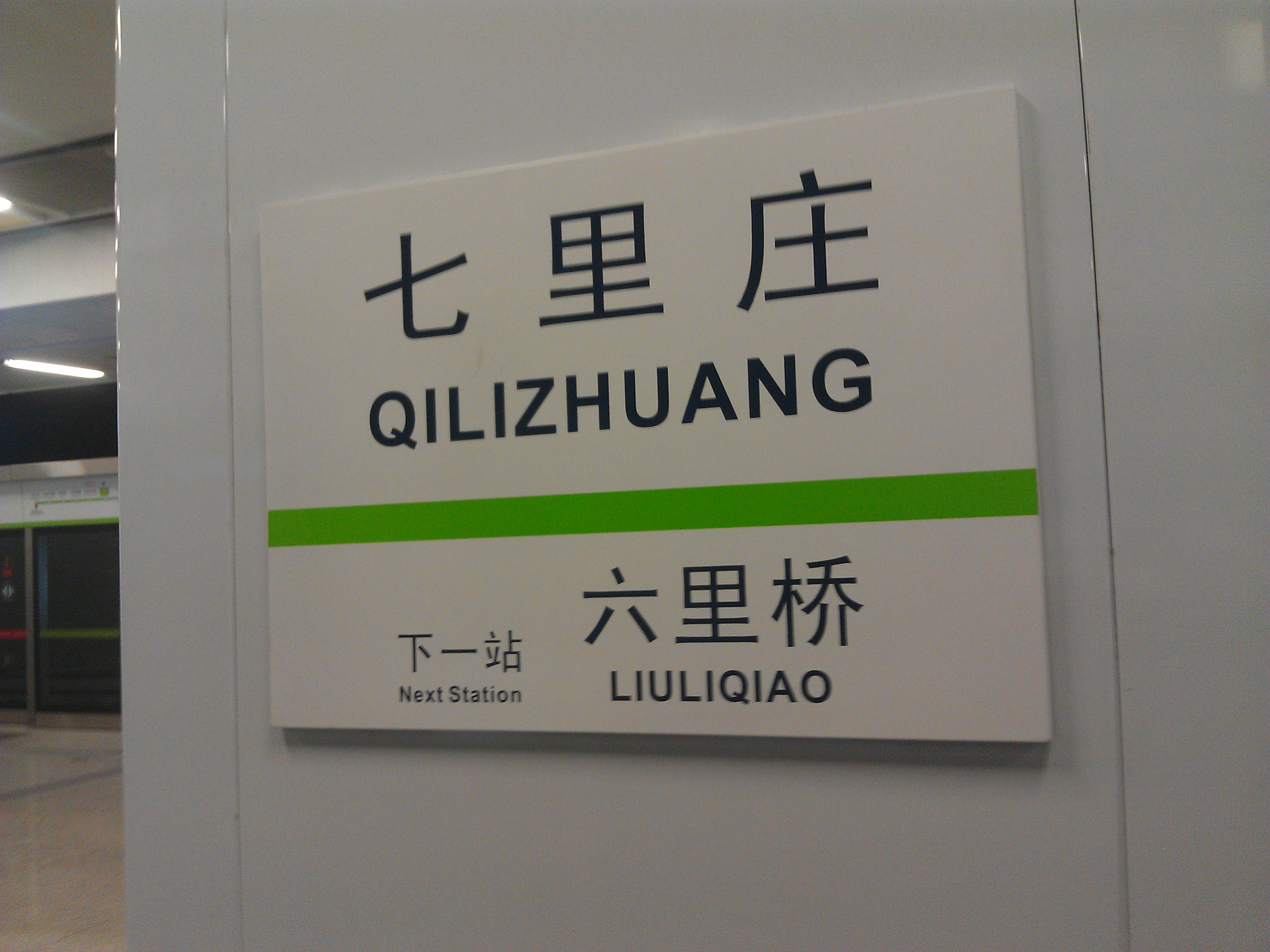 北京地铁七里庄站指示牌